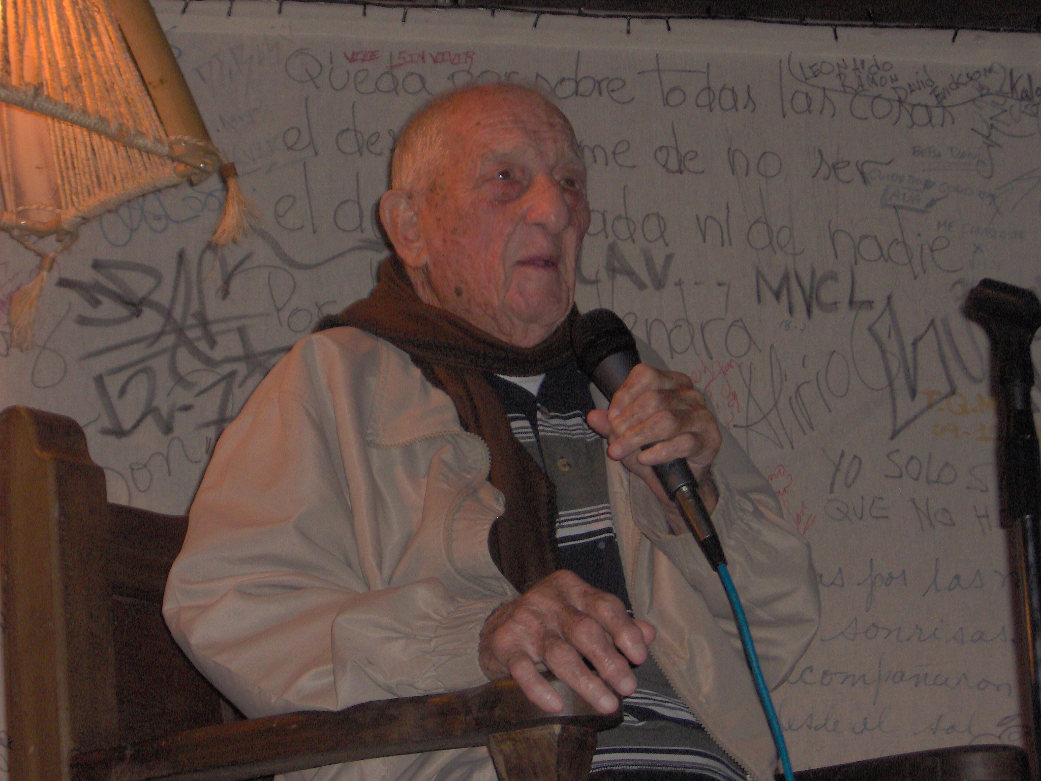 Alberto Granado, es un escritor argentino, nacido el 8 de agosto de 1922 en Buenos Aires. Estudió Bioquímica, y a los treinta años de edad decidió dejar su tierra para hacer un viaje sin rumbo fijo por toda latinoamérica con su buen amigo, Ernesto "Che" Guevara. En un principio pensado como un simple derrotero turístico, la contemplación a lo largo del trayecto de las constantes calamidades a las que eran sometidos los sectores más humildes, tuvo un efecto determinante en la modelación del pensamiento político de ambos jóvenes y dejó profundas huellas en la historia de la segunda mitad del siglo XX. Foto tomada en Mérida - Venezuela el 28/03/2007. por Jesús Molina